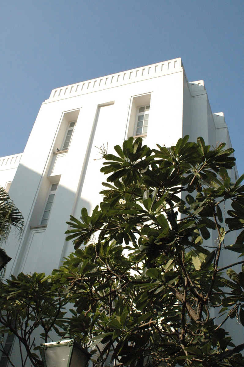 Imperial Hotel, Delhi.